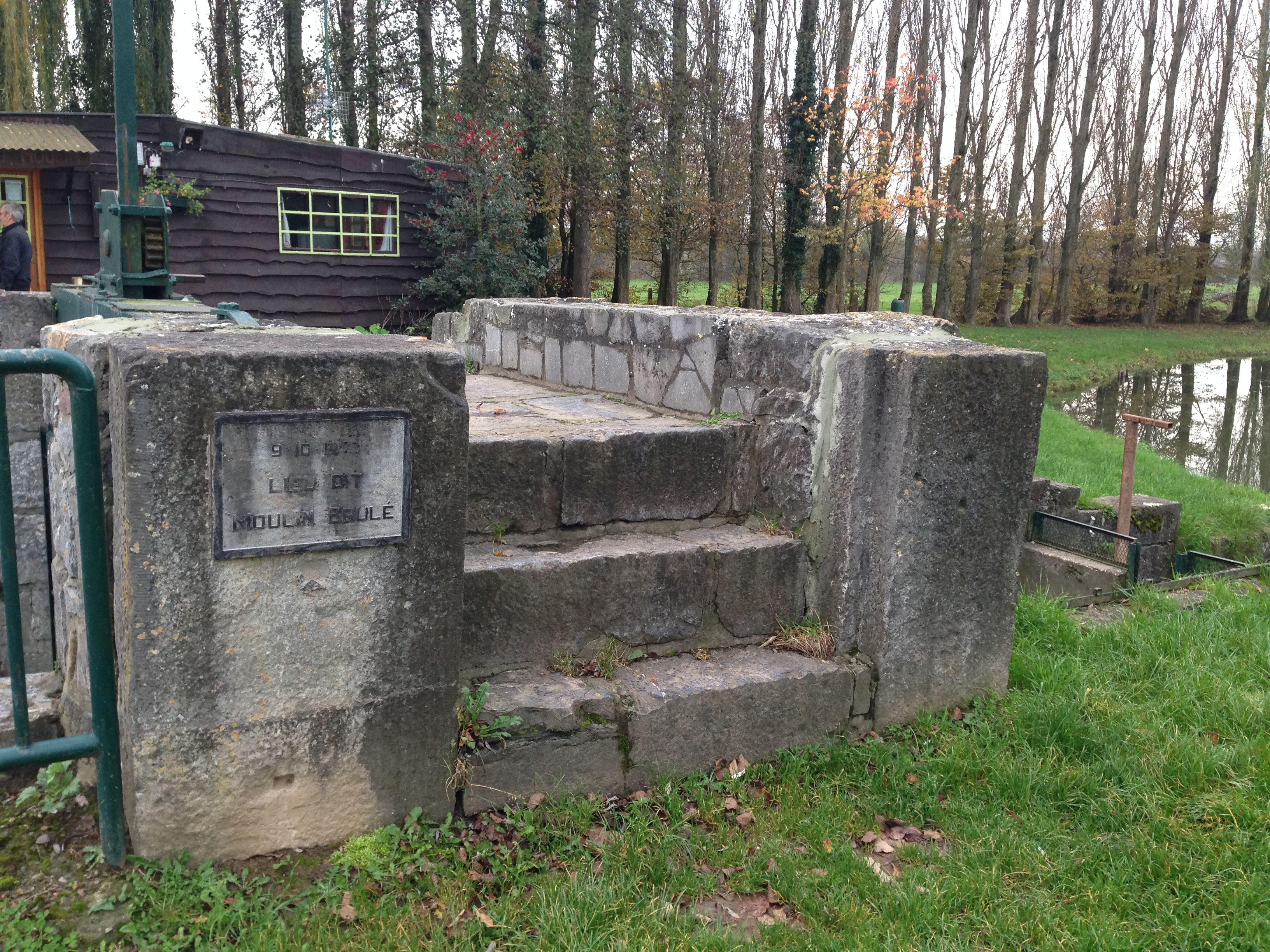 Le moulin brulé de Quiévrain.